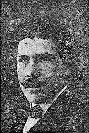 José Ayats Surribas